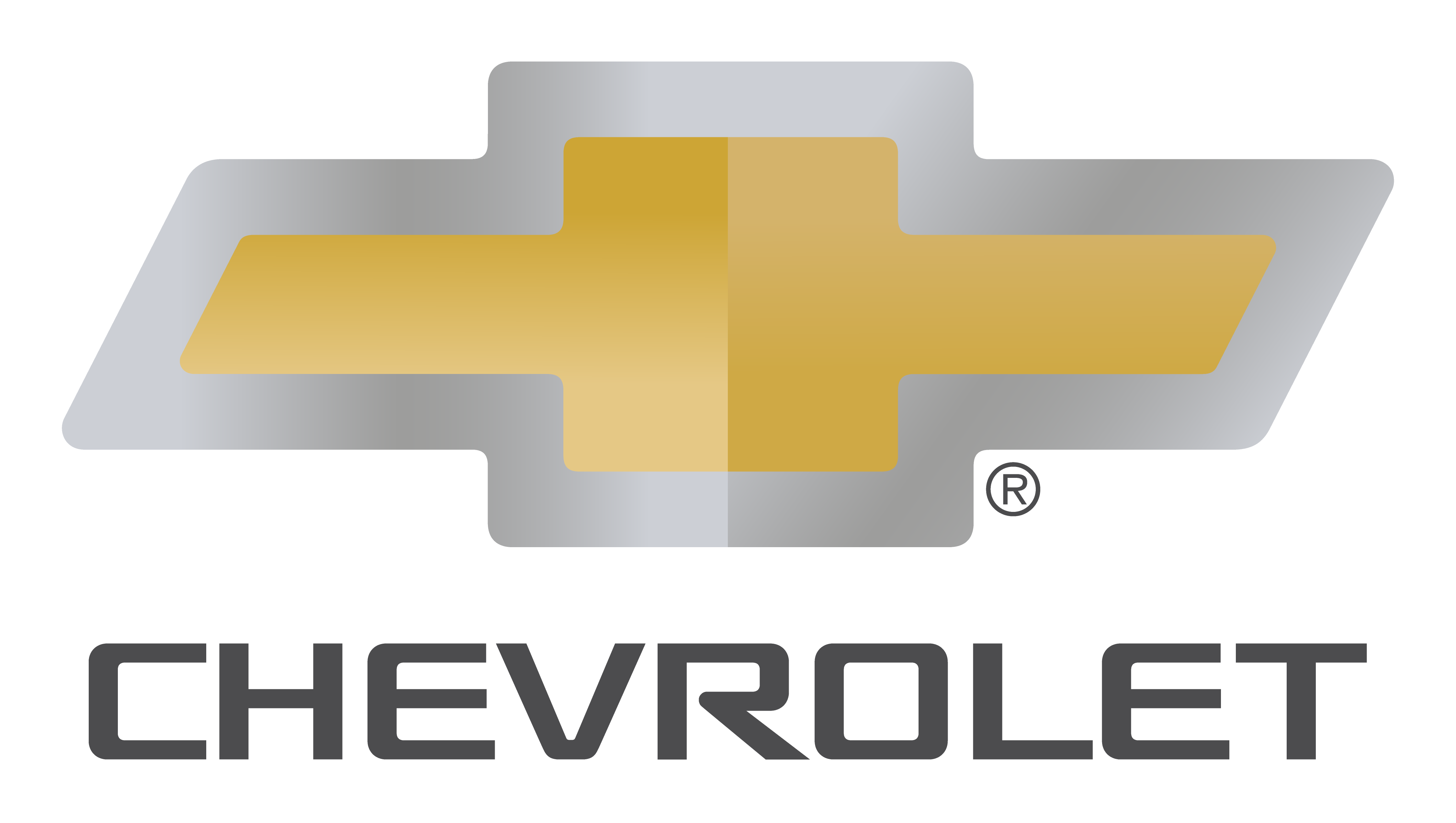 Logotipo utilizado en Sudamérica por los productos Chevrolet.